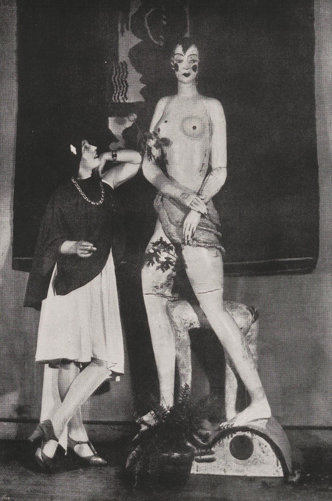 Vally Wieselthier im Contempora Studio, New York City, 1928/1929. Hier mit einer ihrer Keramikfiguren